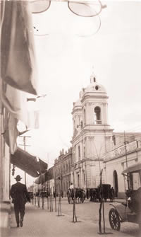 Fotografía de la Ciudad de San Juan Argentina en el año 1894. Vista a la antigua catedral, destruida durante el sismo de 1944.